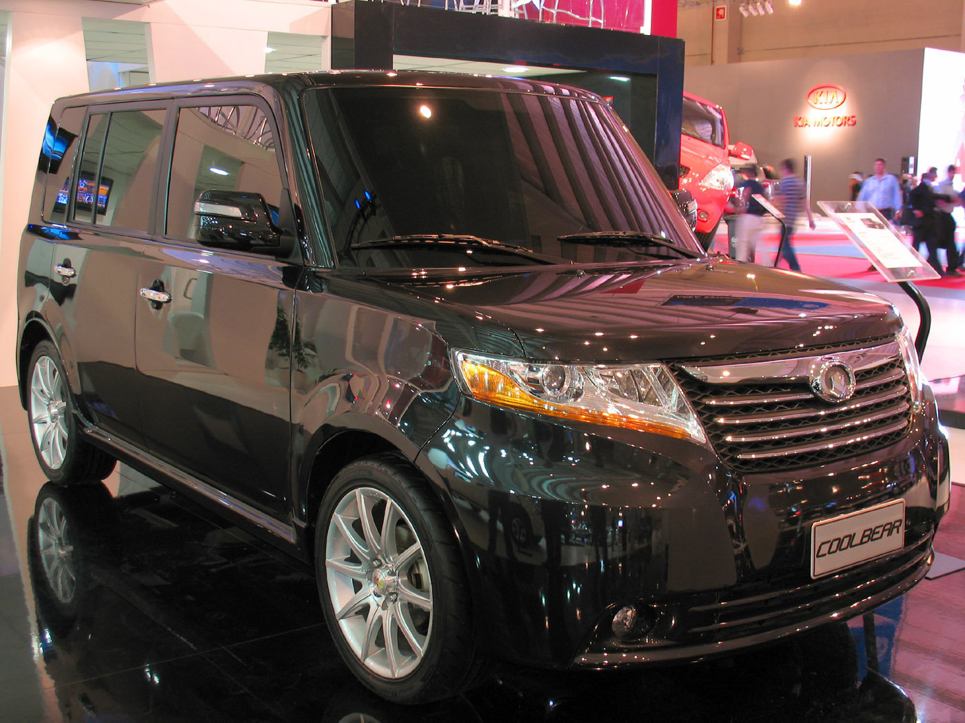 Coolbear in Santiago autoshow, 2010